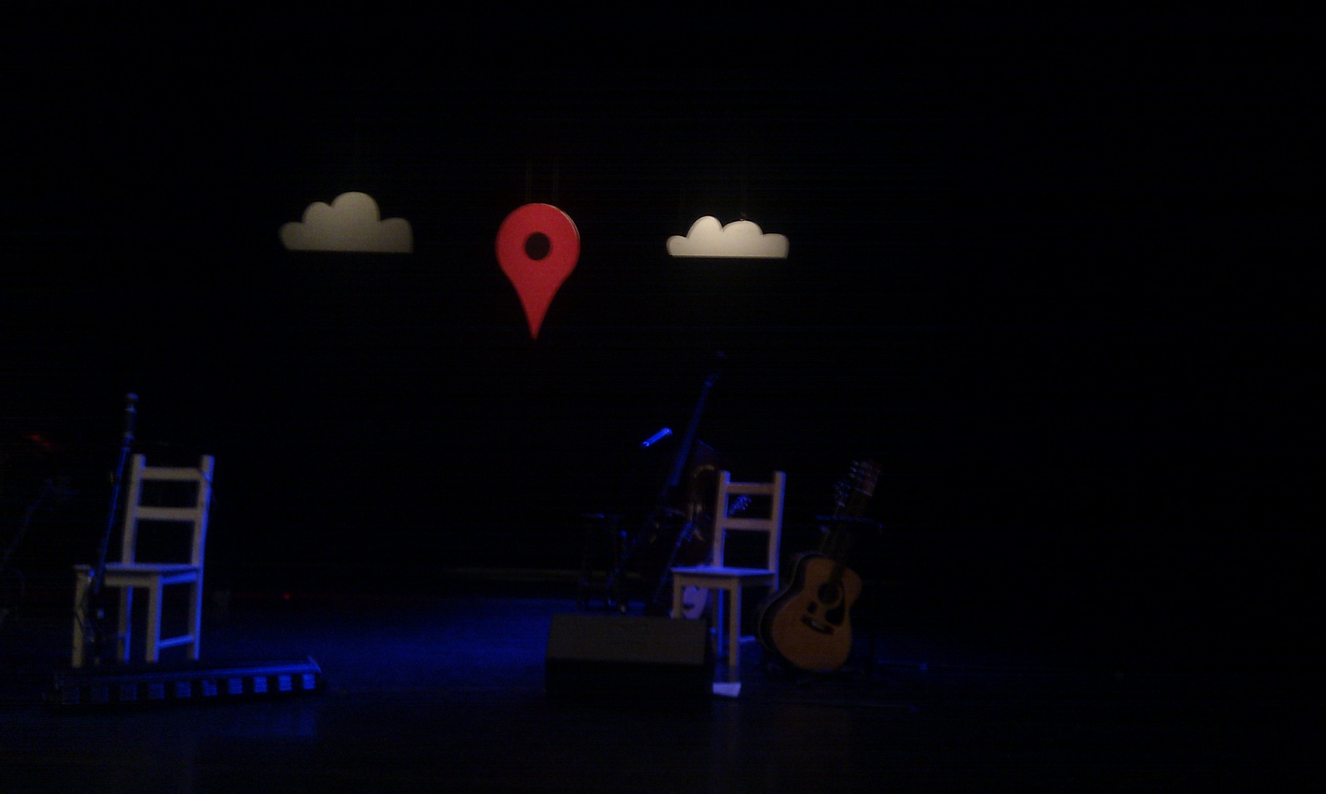 De muzikale theatervoorstelling 'Gunder' van Daniël Lohues. Stadsschouwburg Arnhem 17-02-2012.